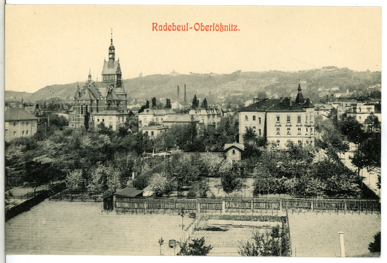 Radebeul; Blick auf Oberlößnitz mit Kirche This postcard is from publisher Brück & Sohn in Meißen ( postcard has a unique number 13446 and is available in a higher resolution at the publisher. This images was uploaded in a cooperation project between Wikipedians and the publisher.